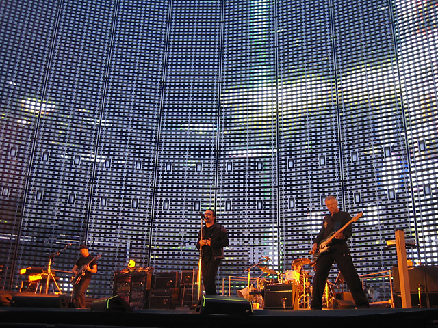 U2, Brussels, King Baudouin Stadium. Vertigo Tour Europe opening night (10. June 2005). Author : Bertrand Perron